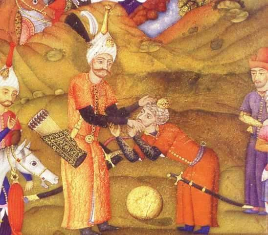 Babur , I İsmayılın əlindən öpür. Miniatür II Şah Abbasın əmri ilə 1665-ci ildə Əliqulu bəy Cabbardar tərəfindən çəkilmişdir.